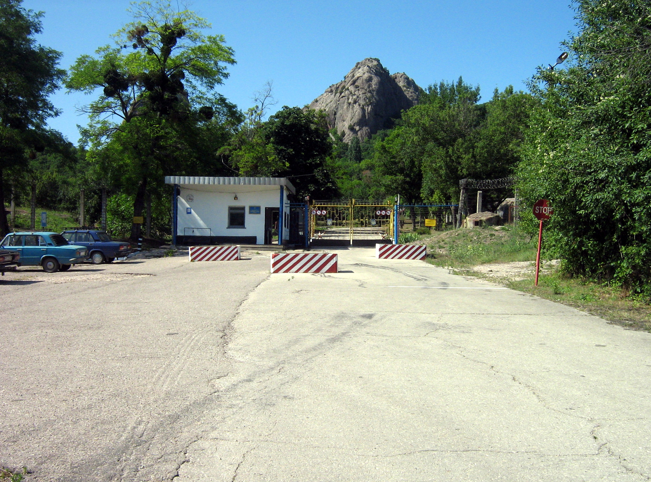 Воинская часть в Краснокаменке Феодосийского горсовета.